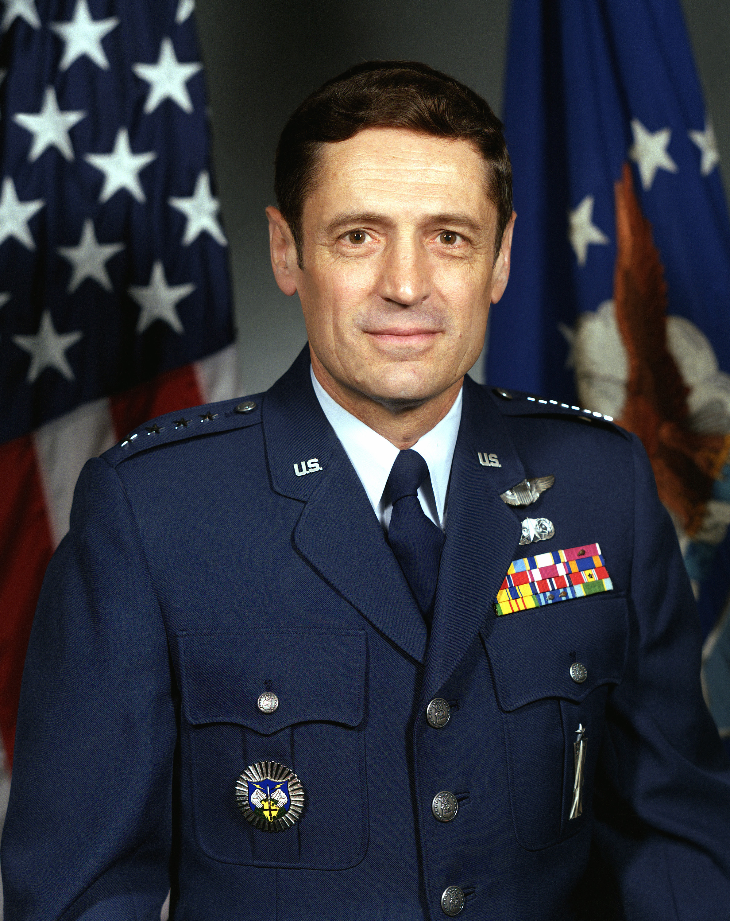 General Robert T. Herres, USAF.